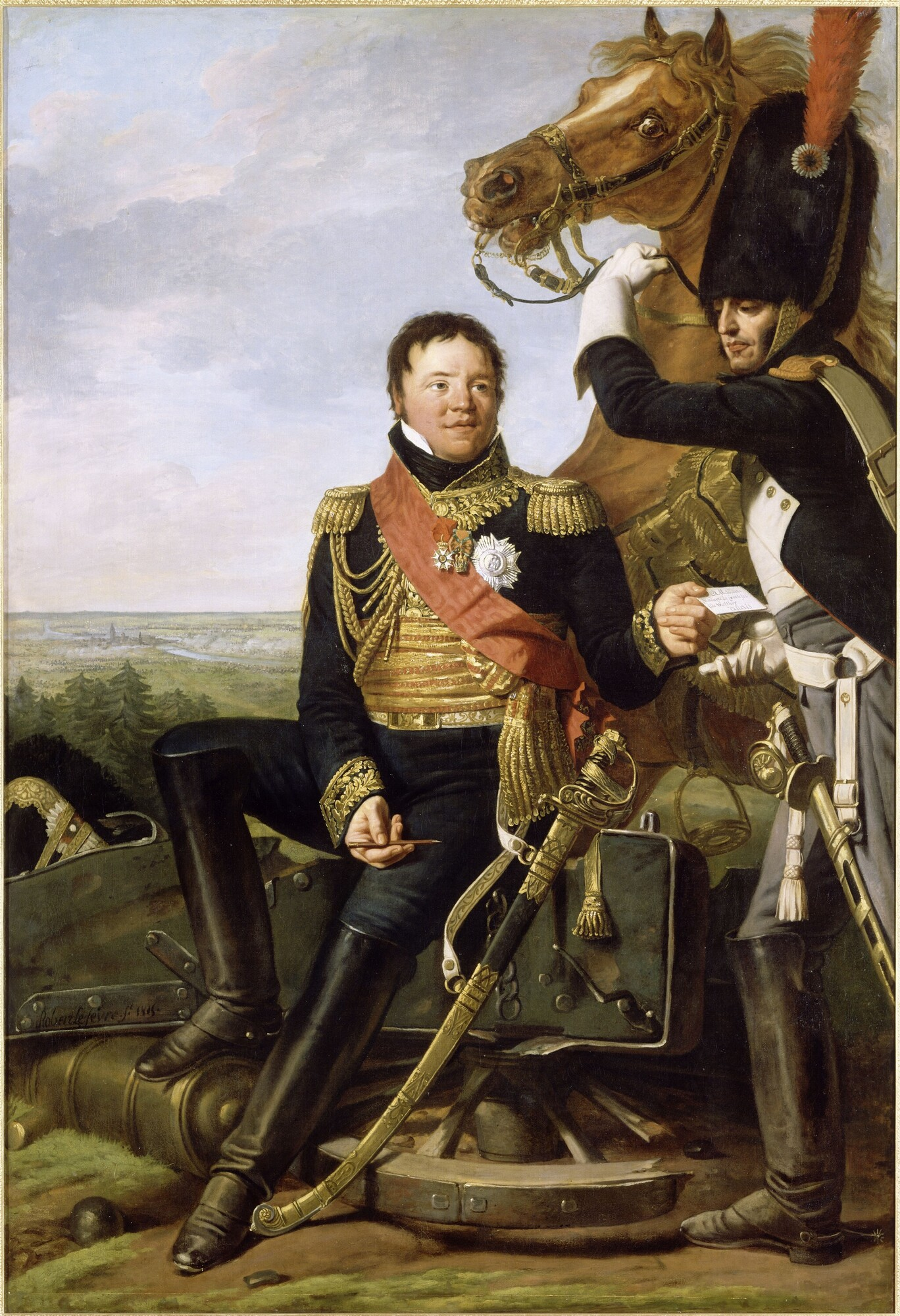 Général_WALTHER_(1761-1813) avec, à ses côtés, un grenadier à cheval de la Garde qui prend ses ordres. Tableau de Robert Lefèvre peint après 1805 (Le Général Walther est représenté avec l'insigne de chevalier de l'Ordre de la Couronne de Fer) conservé au château de Versailles.